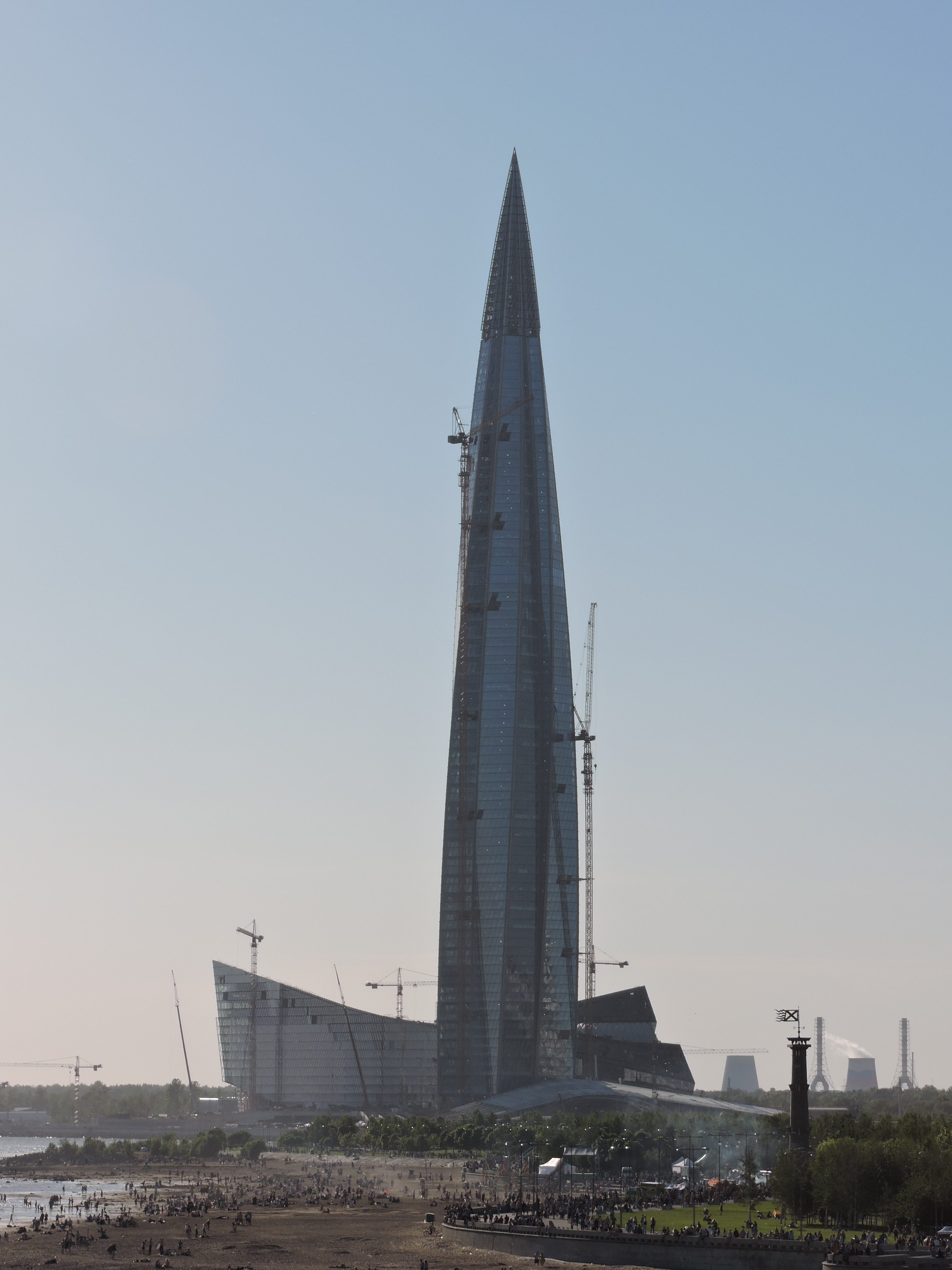 Лахта-центр